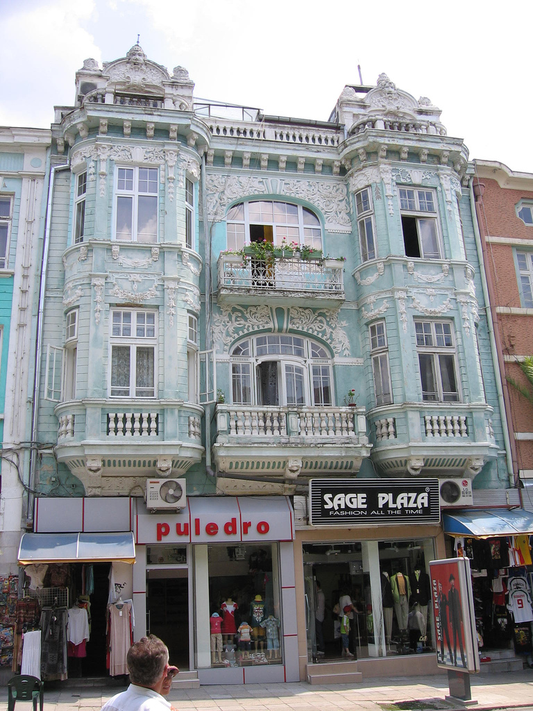 Varna, Bulgaria